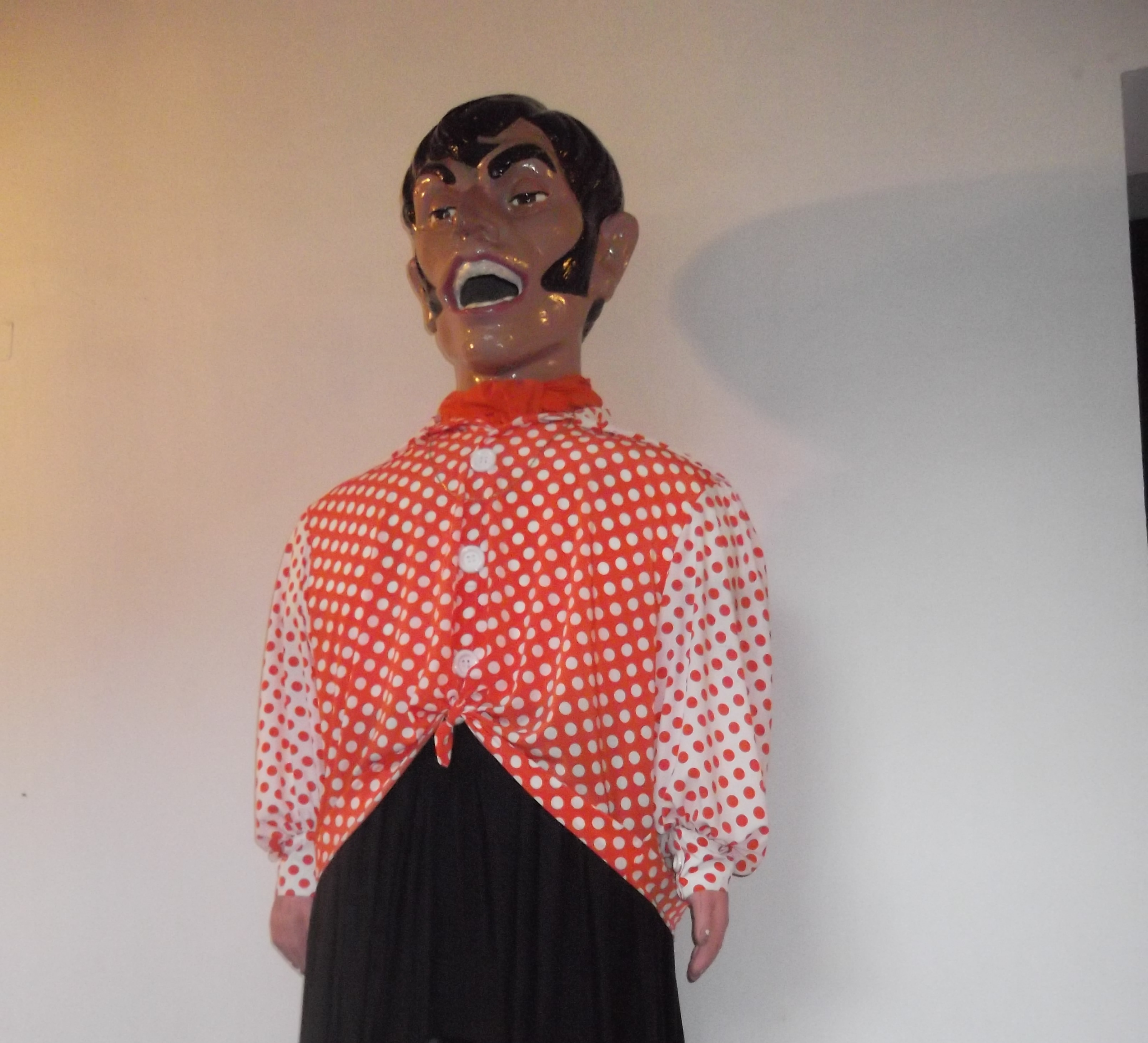 Gigantes de Alcalá de Henares